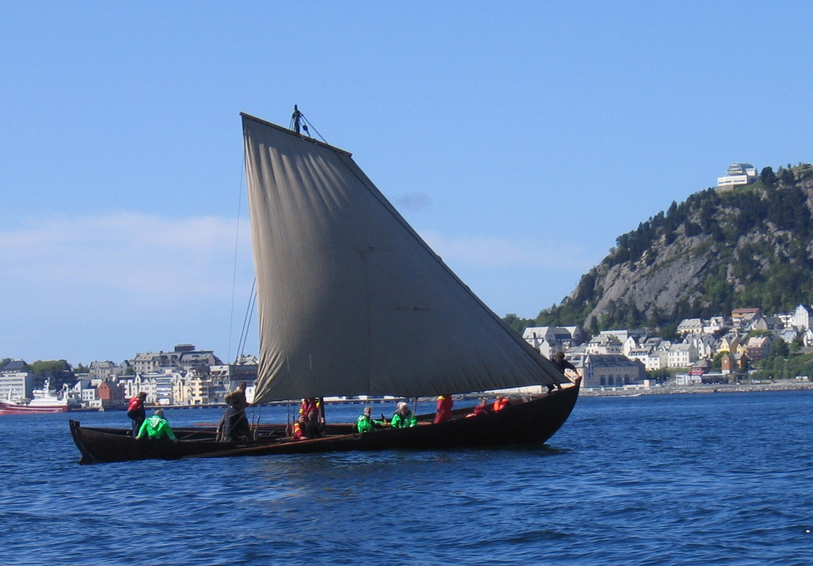 Sunnmørsottring - Old norwegian fishingboat